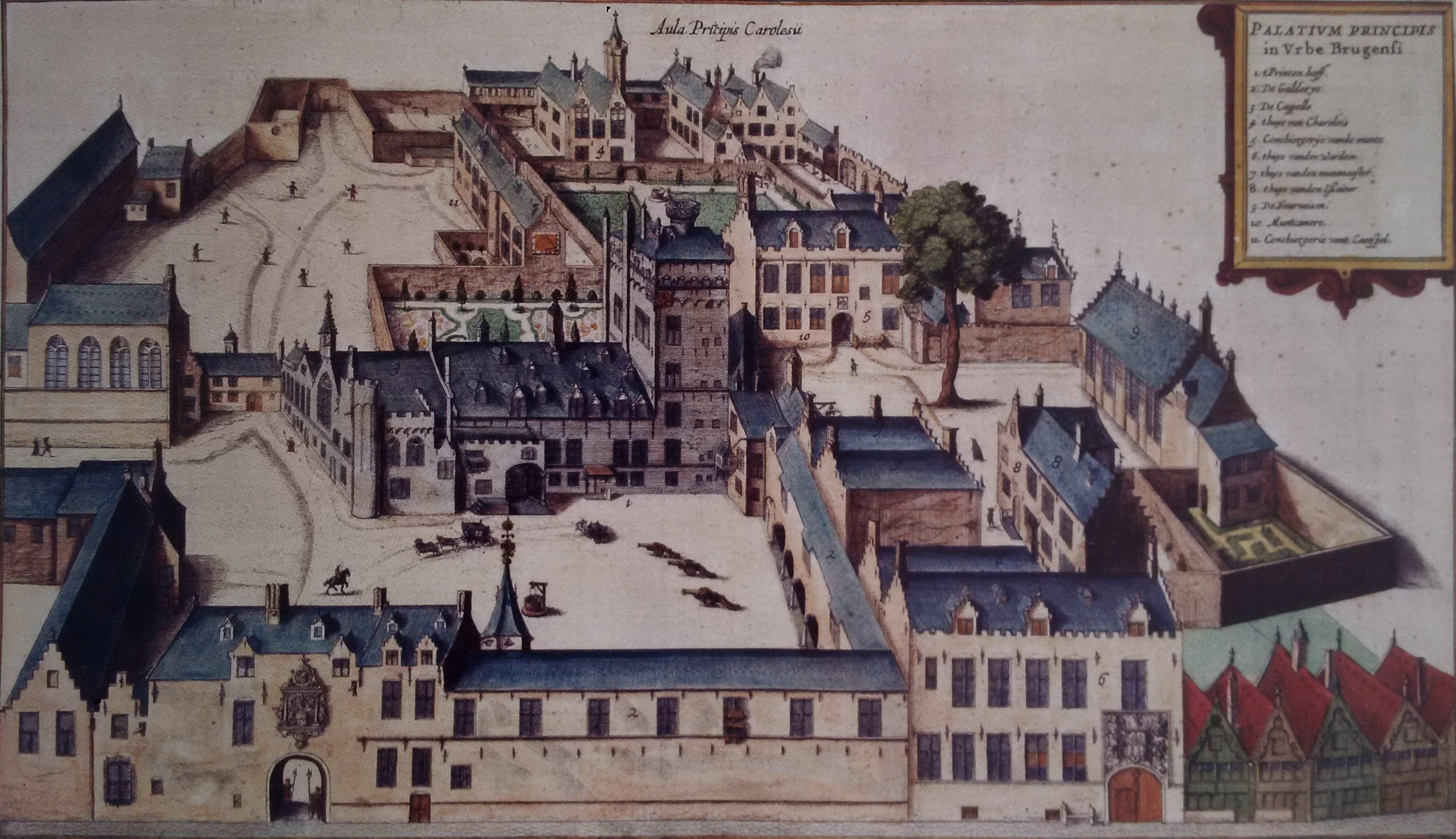 Deze gravure, opgenomen in Antonius Sanderus' boek Flandria Illustrata (vol.1641), toont het Prinsenhof te Brugge vanuit het zuidoosten en is waarschijnlijk gebaseerd op een oudere bron. Dit beeldmateriaal is dus eigenlijk niet eigentijds. Het toont rechtsboven het Groenhuys (privé-residentie), links daarnaast de dubbele galerij van het Groenhuys (1446-1449), het badhuis (1441-1446) dat de afscheiding vormt tussen het Groenhuysdeel en het tweede open plein waar we enkele kinderen(?) een kaatsspel zien spelen. Rechtsonder het plein zien we de ommuurde tuin en centraal onder het plein het kapelcomplex. Grenzend aan het kapelcomplex zien we de ingang naar de grote zaal (veertiende eeuw), het appartement van de hertogin (1446-1448) en de toren (veertiende eeuw, verhoogd 1459-1459). Vertrekkend vanaf de toren loopt de grote galerij richting (1467) de Noordzandstraat. Aan deze straat zien we ook het ingangsgebouw met 2 wachters.